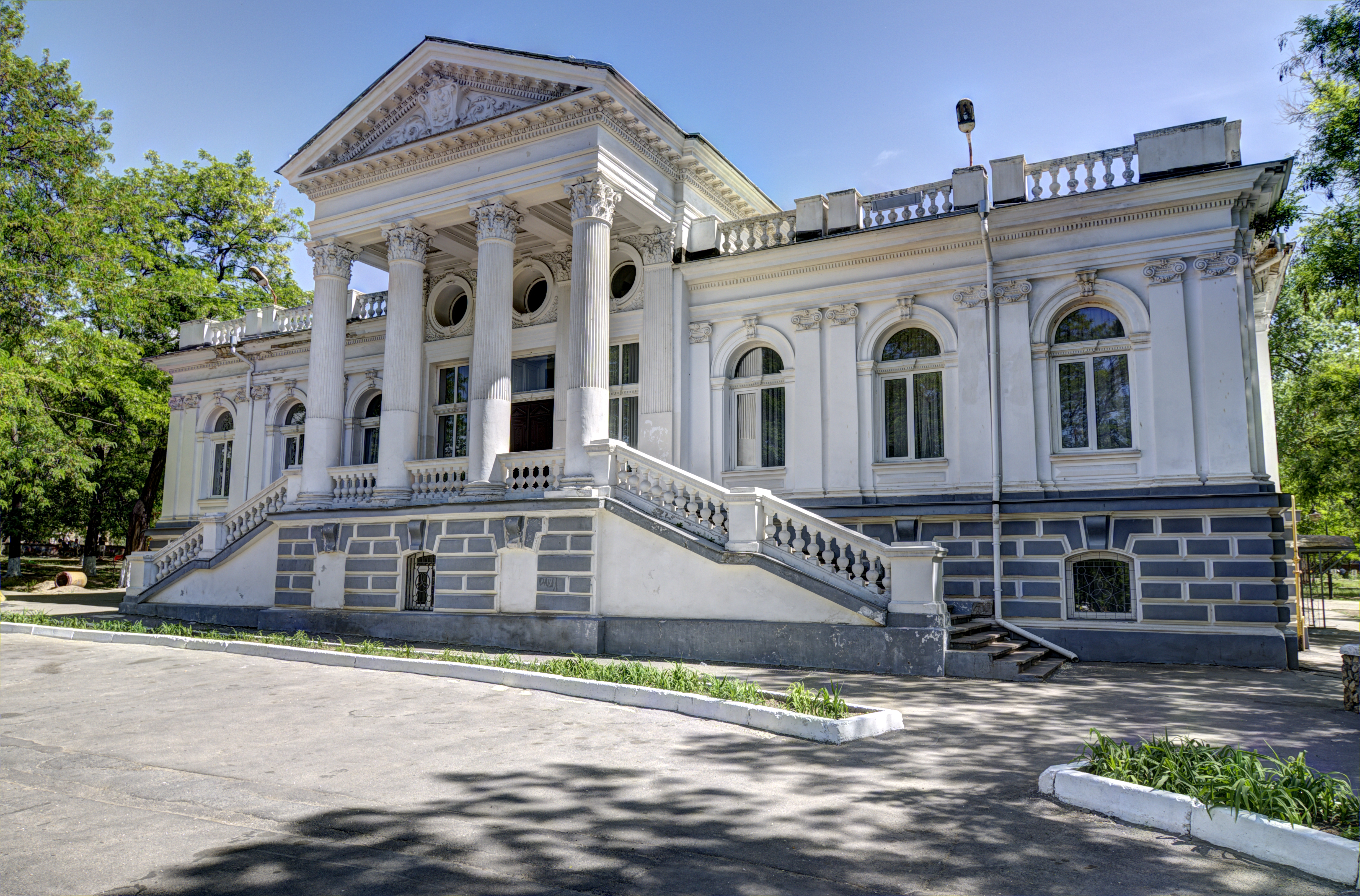 Бібліотека (нині - МіськРАГС), Херсон, 21 Січня вул., 24